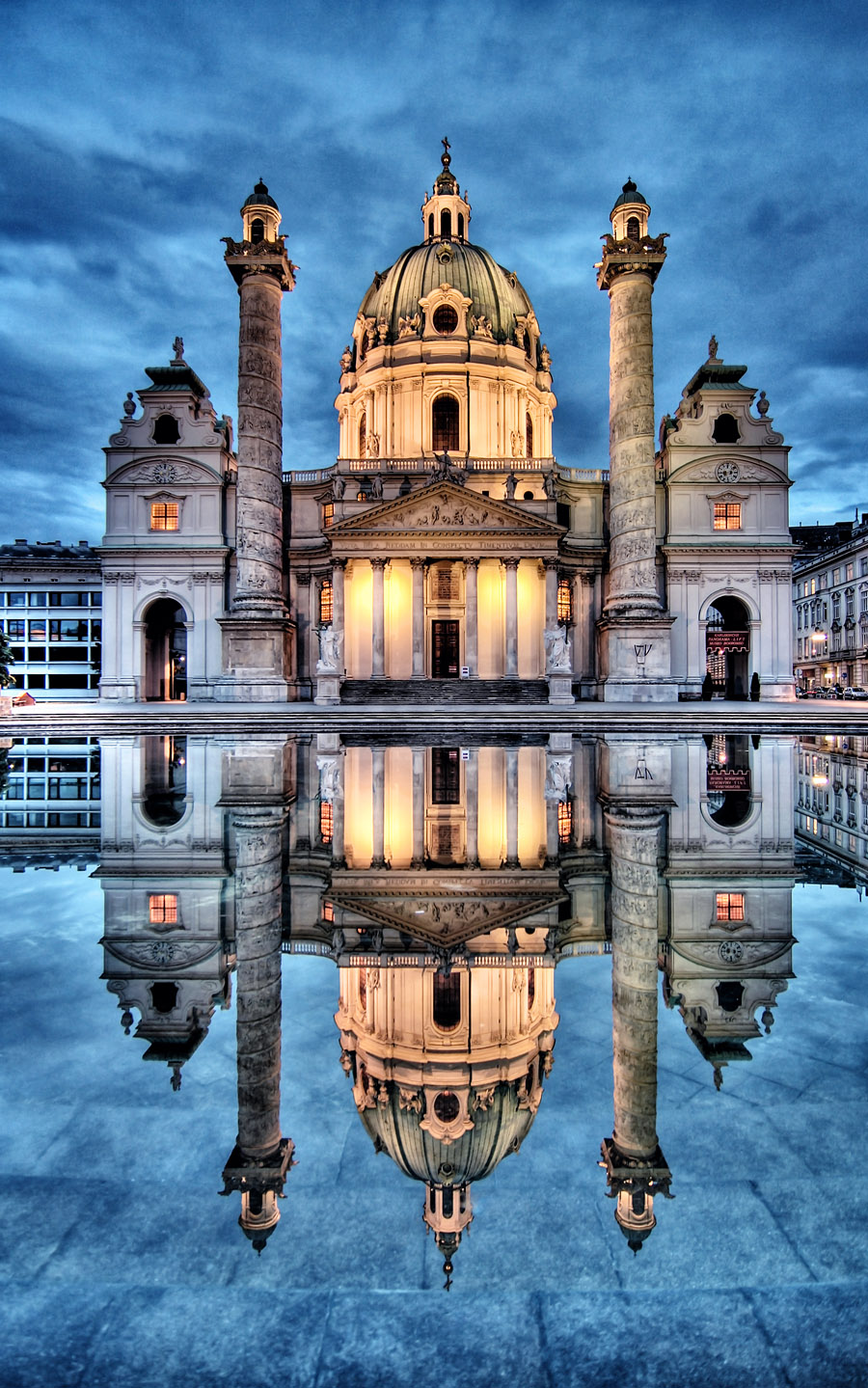 Kath. Pfarrkirche, Pfarrkirche Hl. Karl Borromäus (Karlskirche)